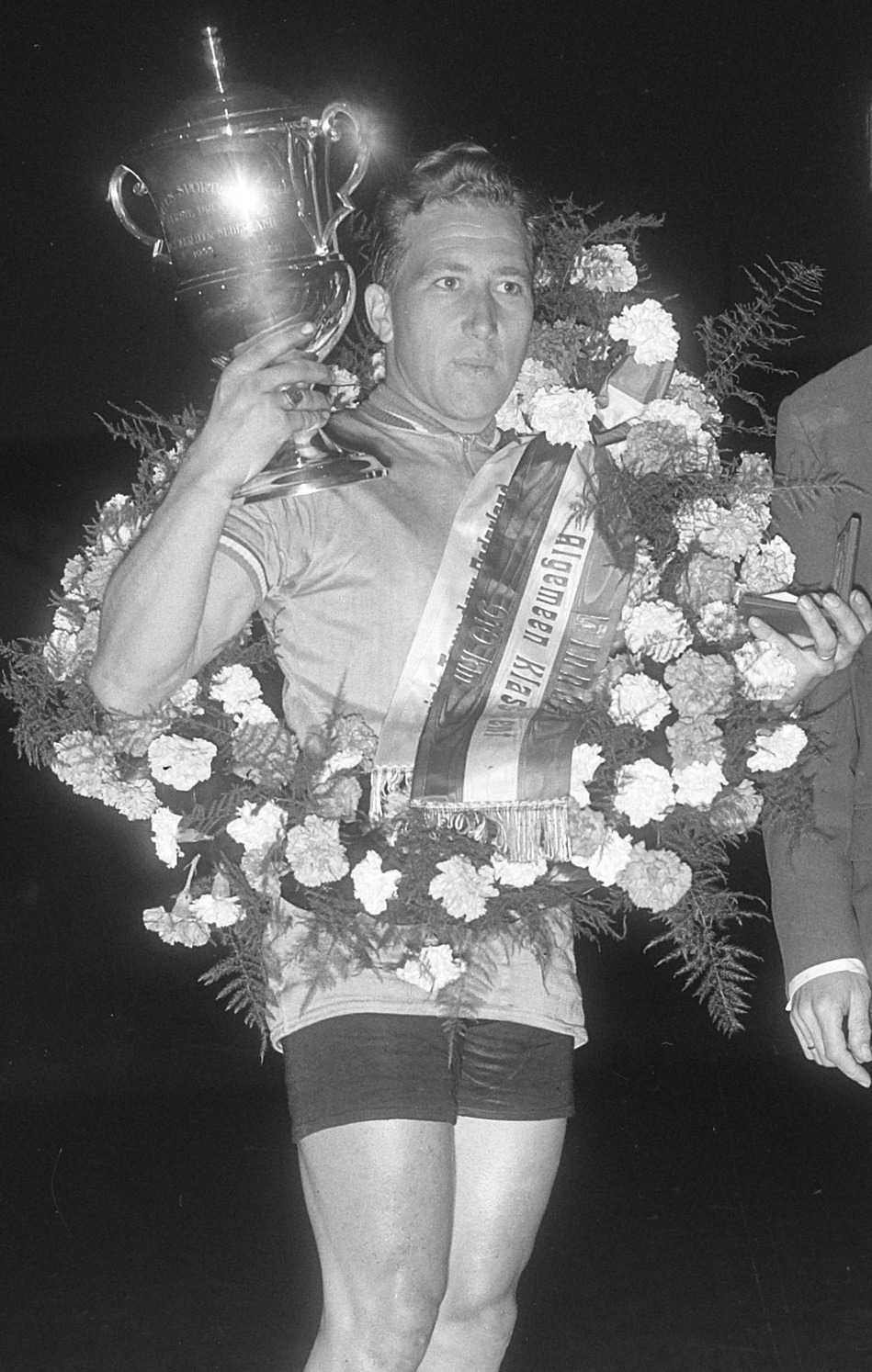 P. Kooyman , Den Haag , winnaar Tour door Nederland